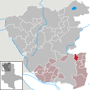 (Original text: Kassieck im Landkreis Salzwedel)